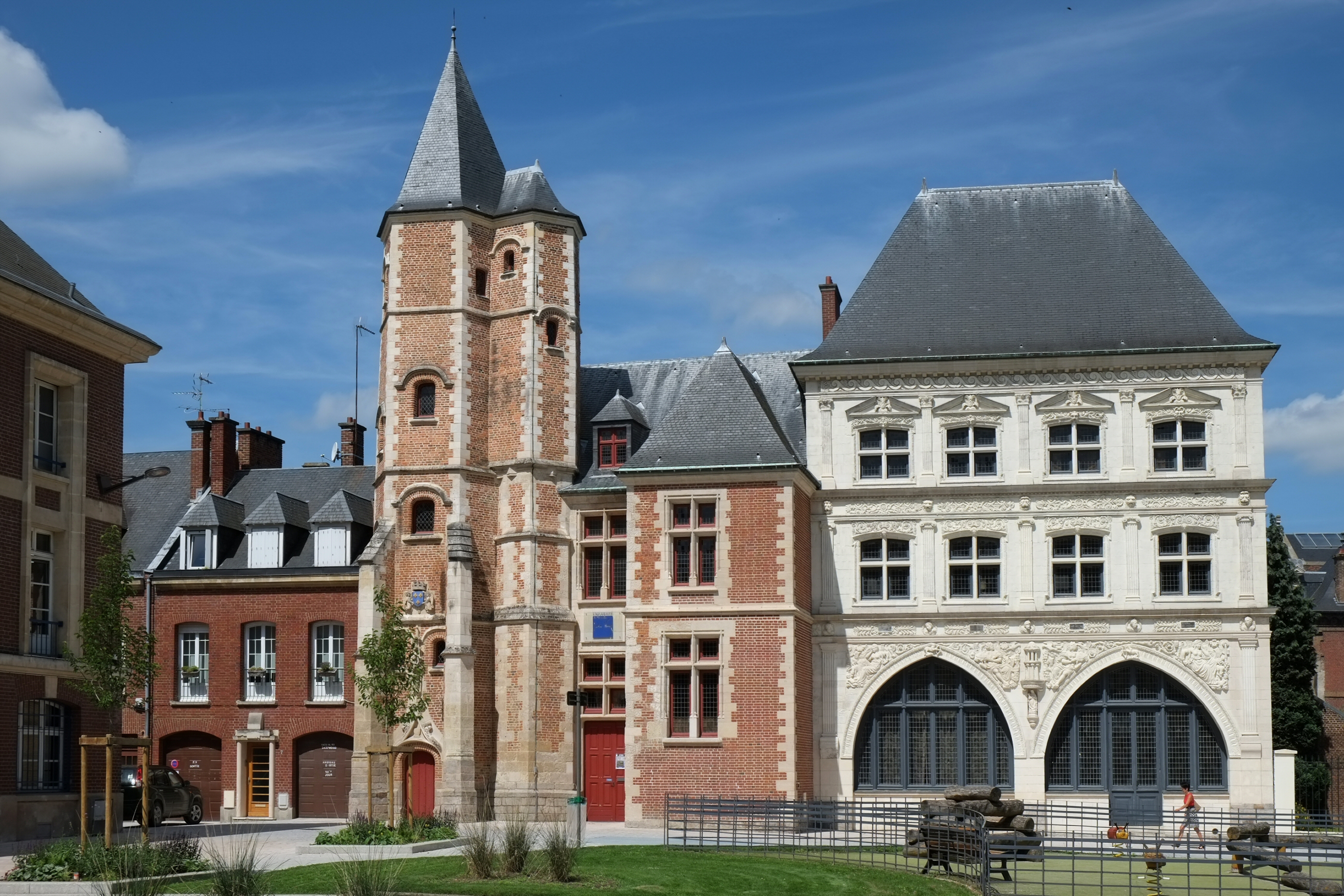 Logis du Roi et maison du Sagittaire Amiens Somme France